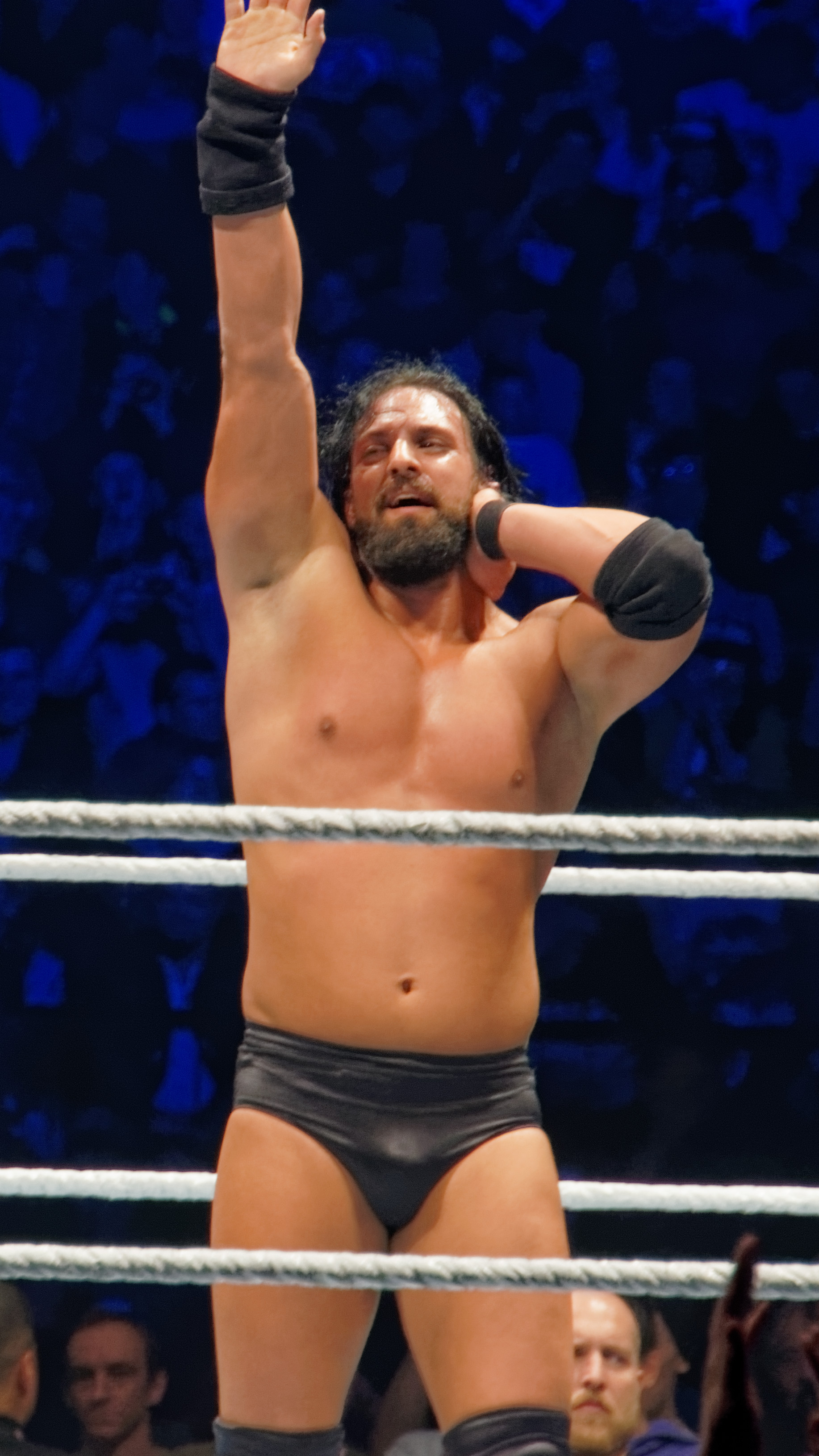 2013-11-08_21-02-27_NEX-6_7972_DxO